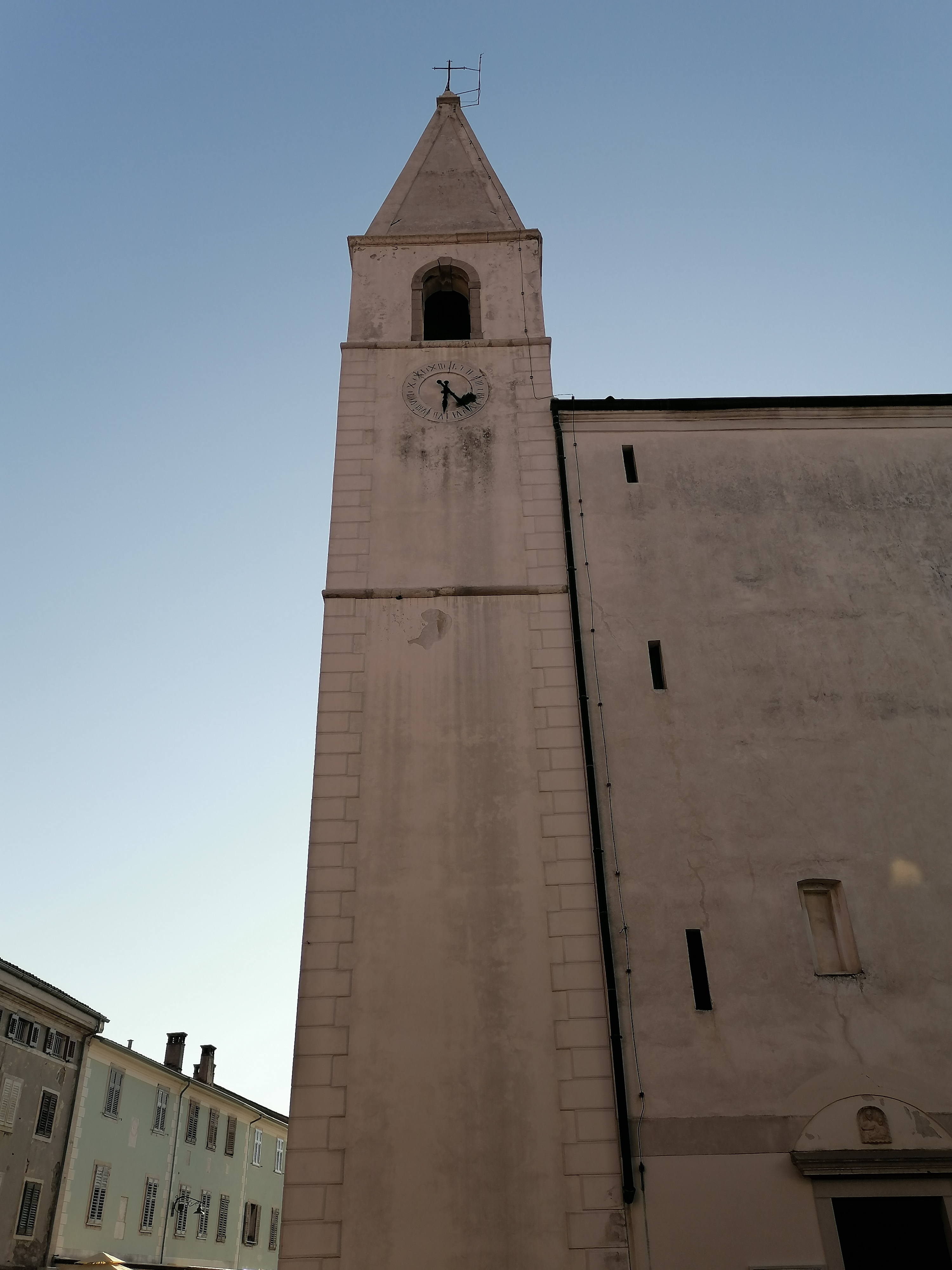 Zvonik cerkve sv. Marije Alietske v Izoli